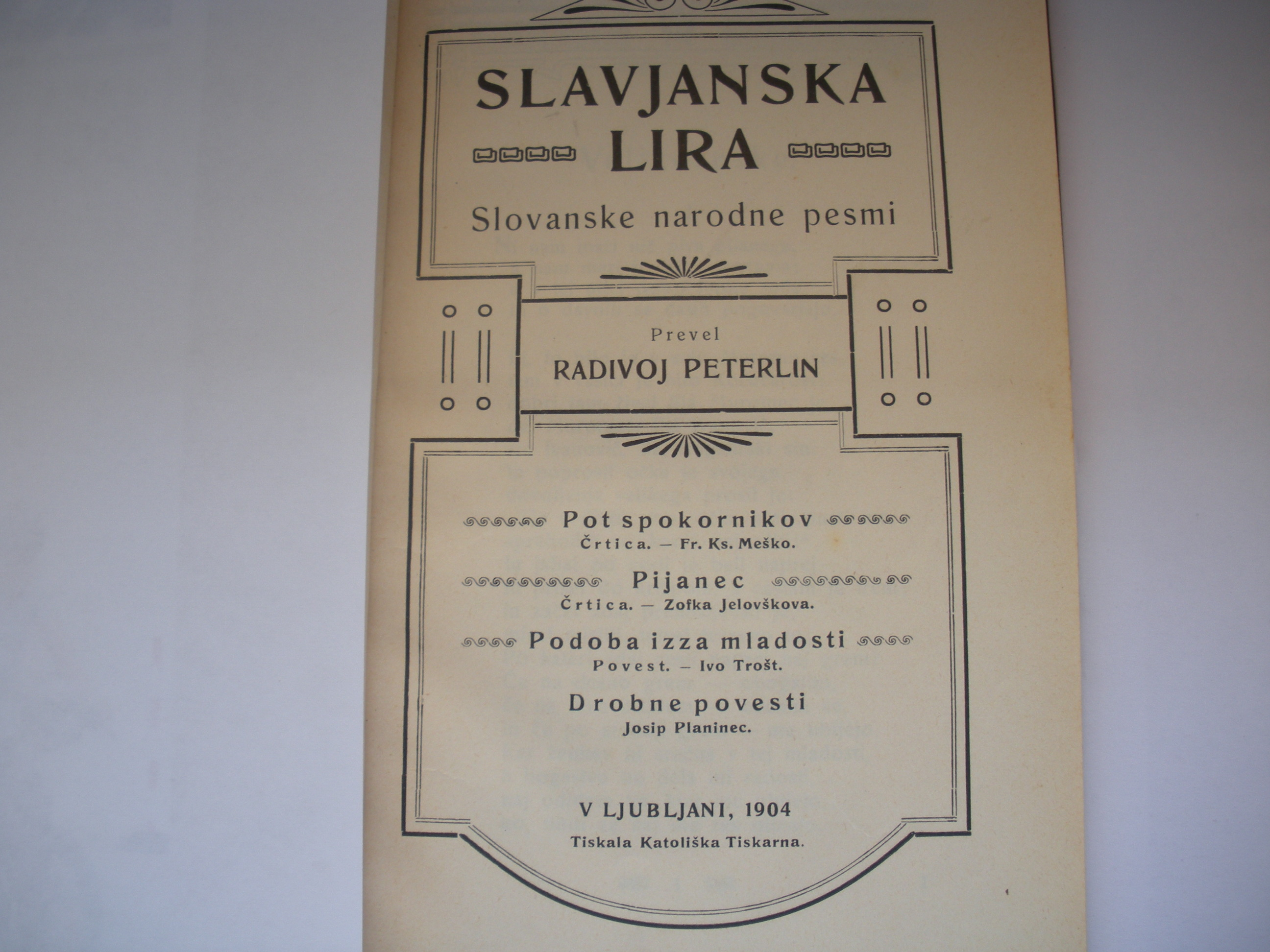 Prva stran knjige Radivoja Petruške Slavjanska Lira.